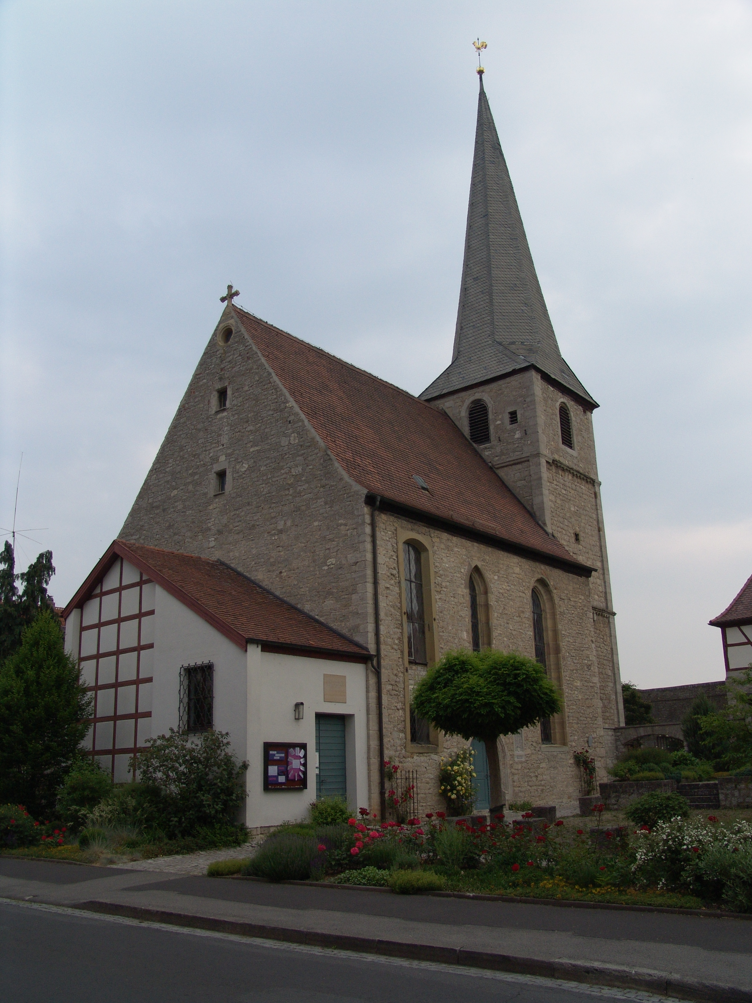 evang.-luth. Kirche St. Martin in Segnitz